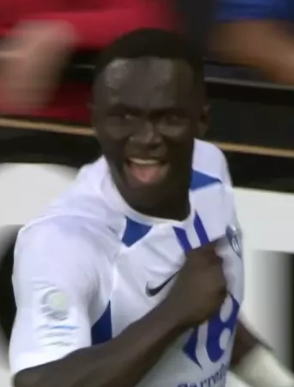 Djitté mentre esulta dopo una doppietta con il Grenoble nel 2019